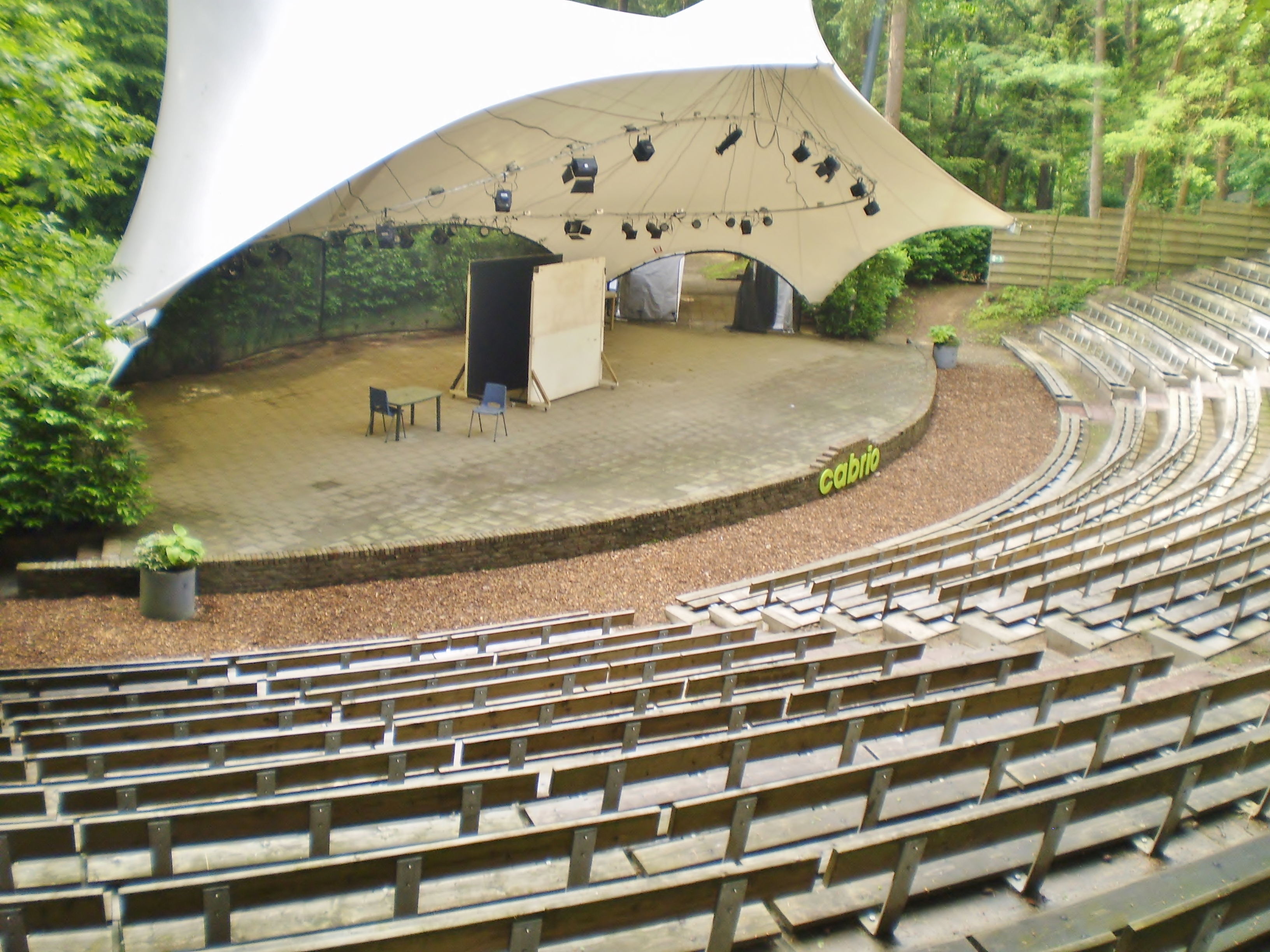 Openluchttheater Cabio